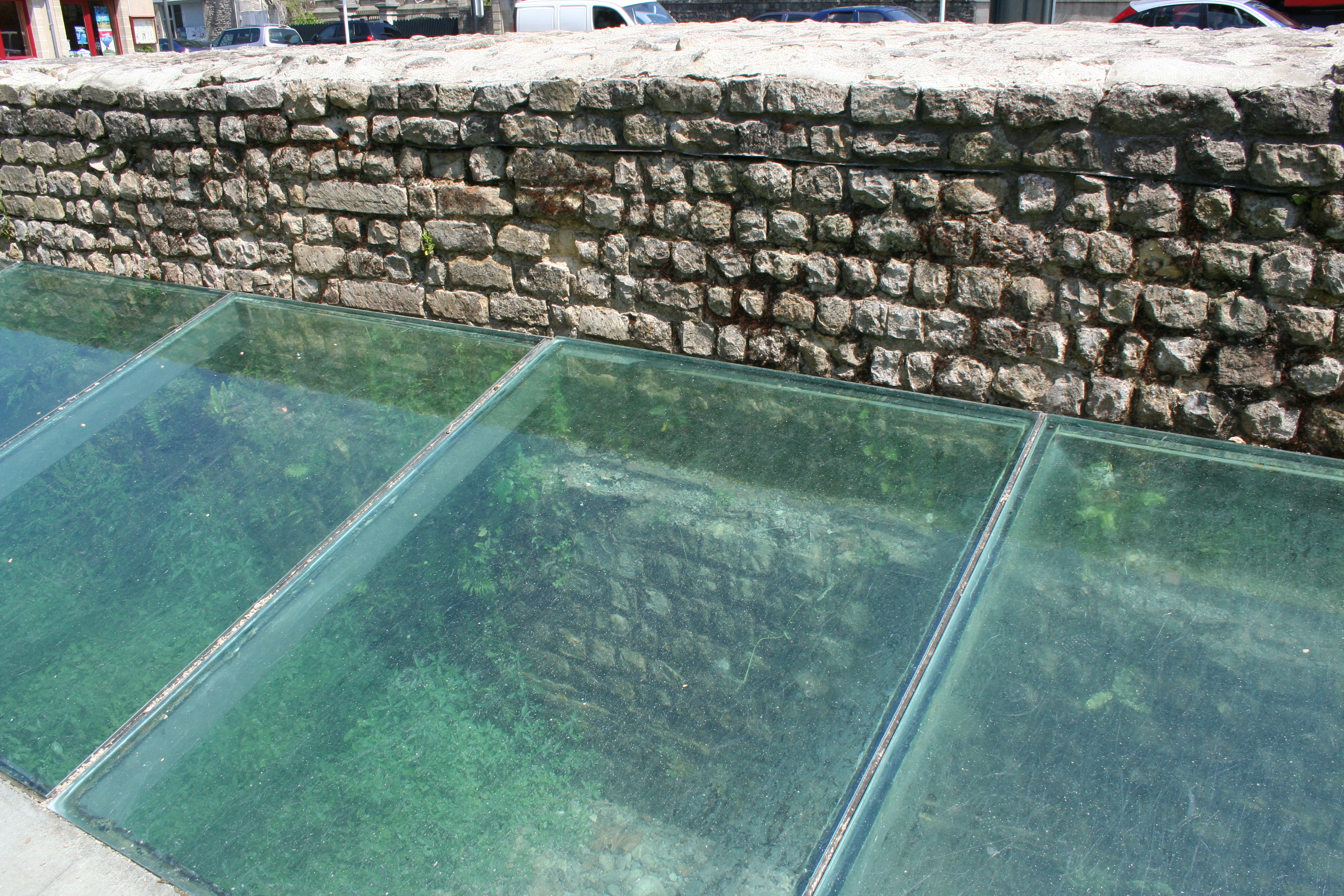 Mur du rempart romain derrière la cathédrale de Bayeux.